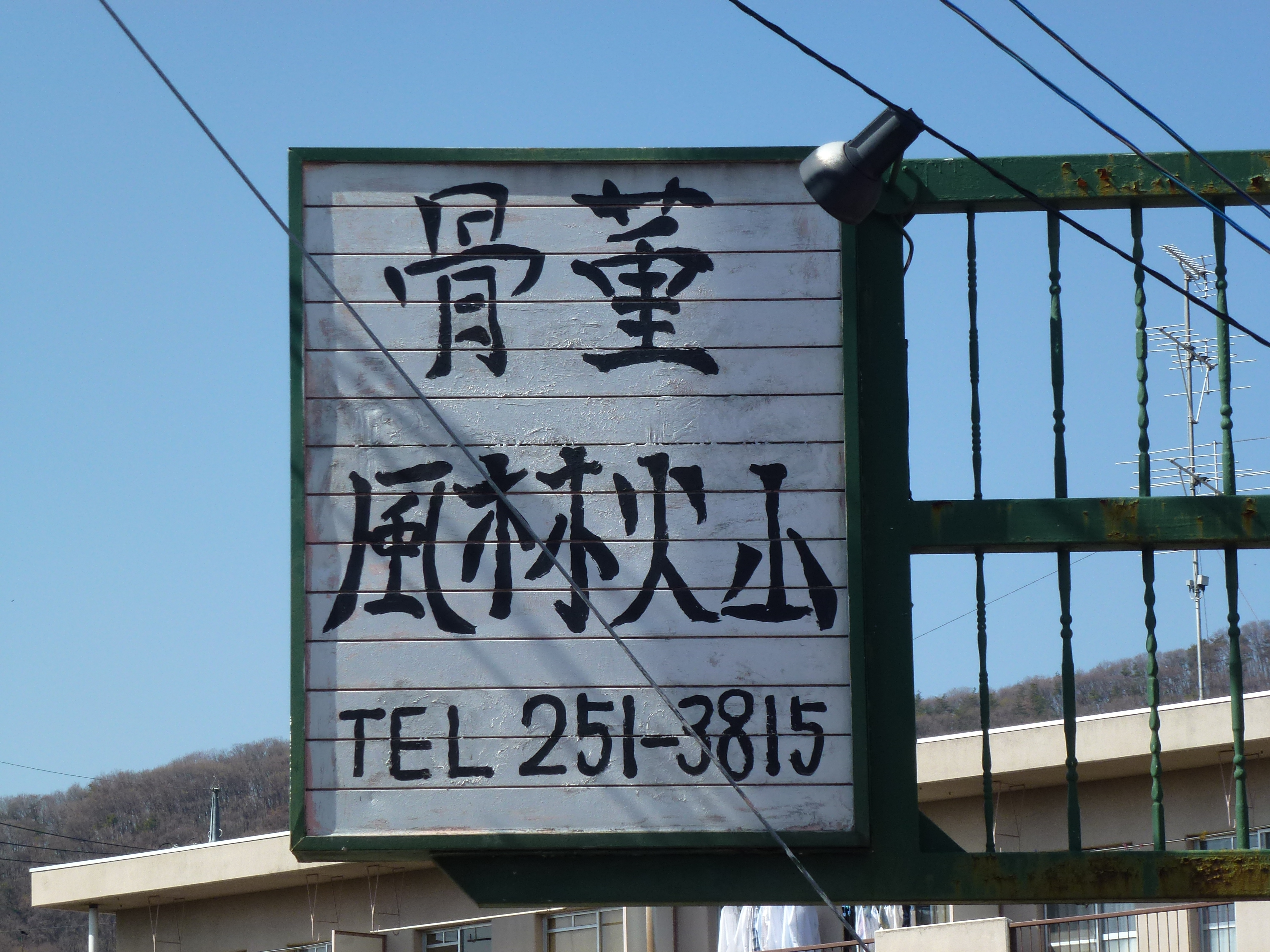 Benutzung des Mottos "Fuhrinkazan" als Name für einen Antiquitätenladen in Kohfu.